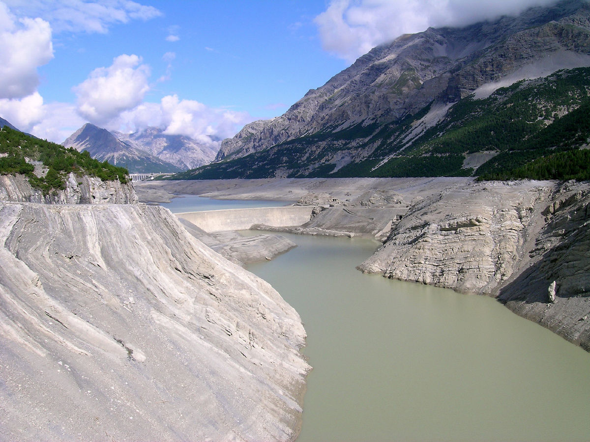 Cancano lake - Valtellina (Sondrio)